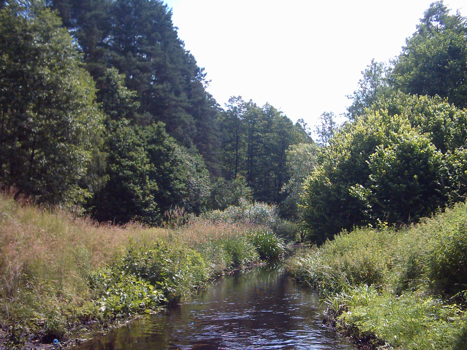 Leśna Prawa-Puszcza Białowieska